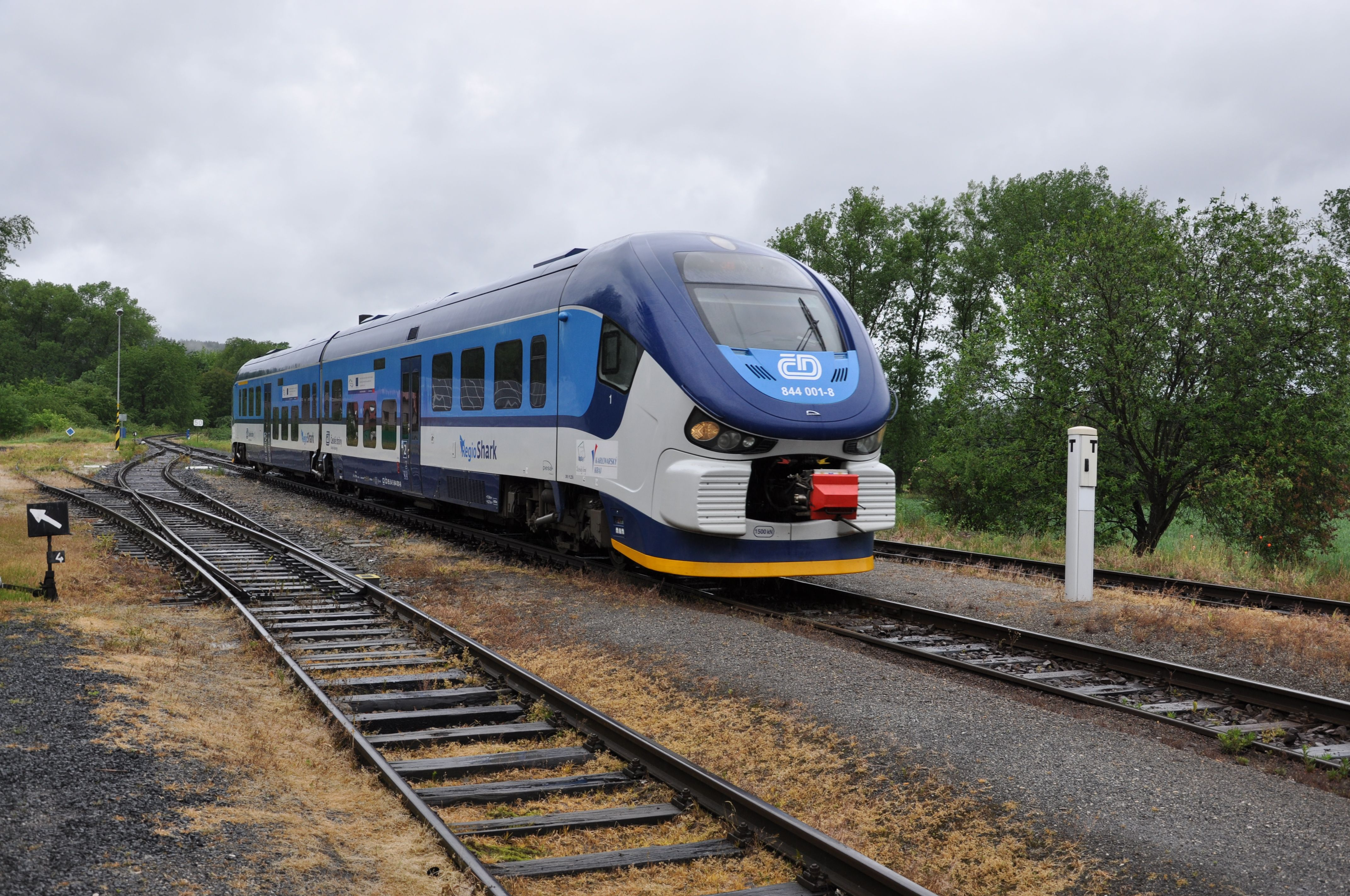 Bahnhof Skalna, Bahnstrecke Tršnice–Luby u Chebu: Der Personenzug kommt von Luby u Chebu und fährt weiter über Tršnice nach Cheb. Das Fahrzeug ist ein Triebwagen der ČD-Baureihe 844 des polnischen Herstellers PESA.